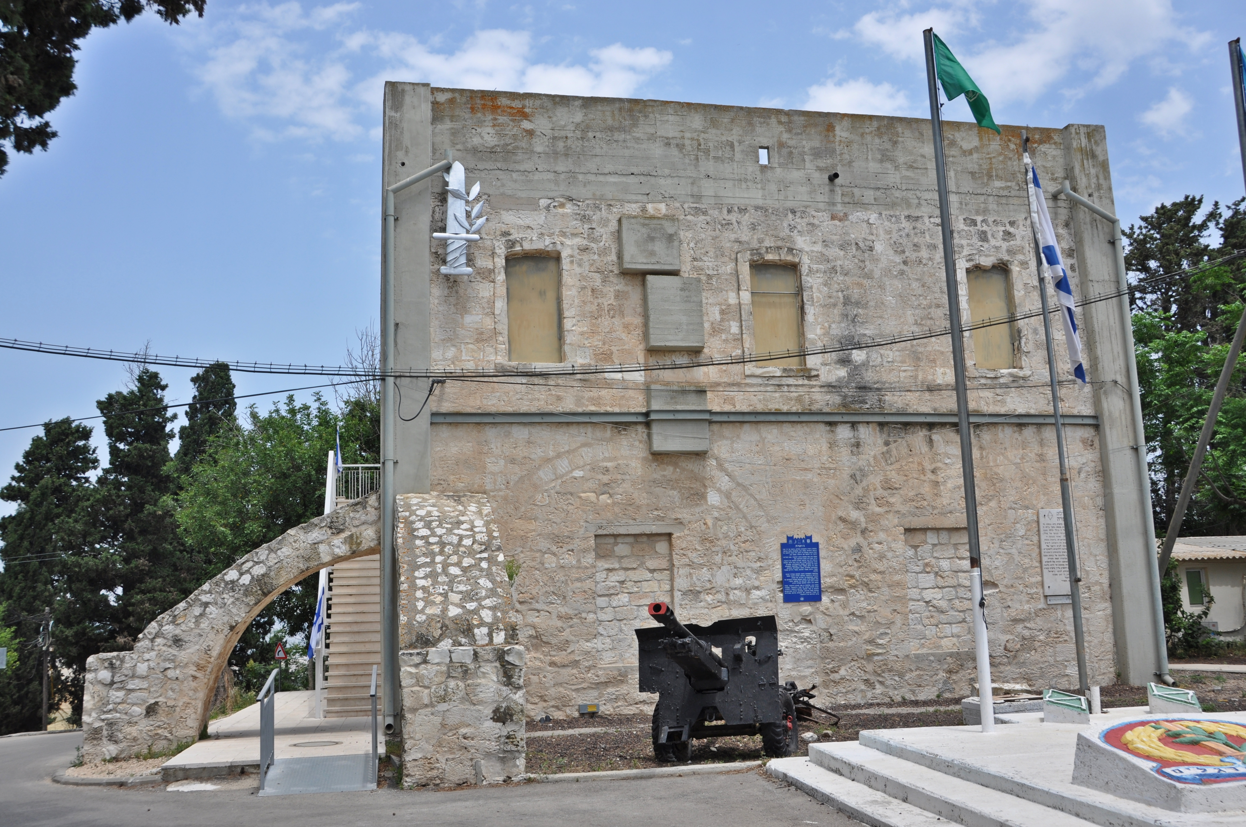 ג'וערה הוא בסיס גדנ"ע ומוזיאון הנמצאים על גבעה ברמות מנשה, במיקום היסטורי ששימש בעבר כבסיס ההדרכה המרכזי למפקדים של ארגון "ההגנה". שמה העברי של הגבעה הוא "גבעת נֹח".